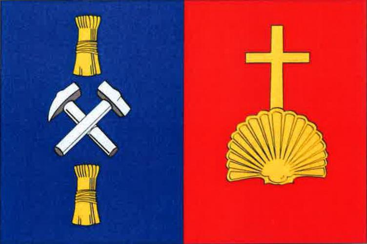 Srbice, okres Teplice, vlajka